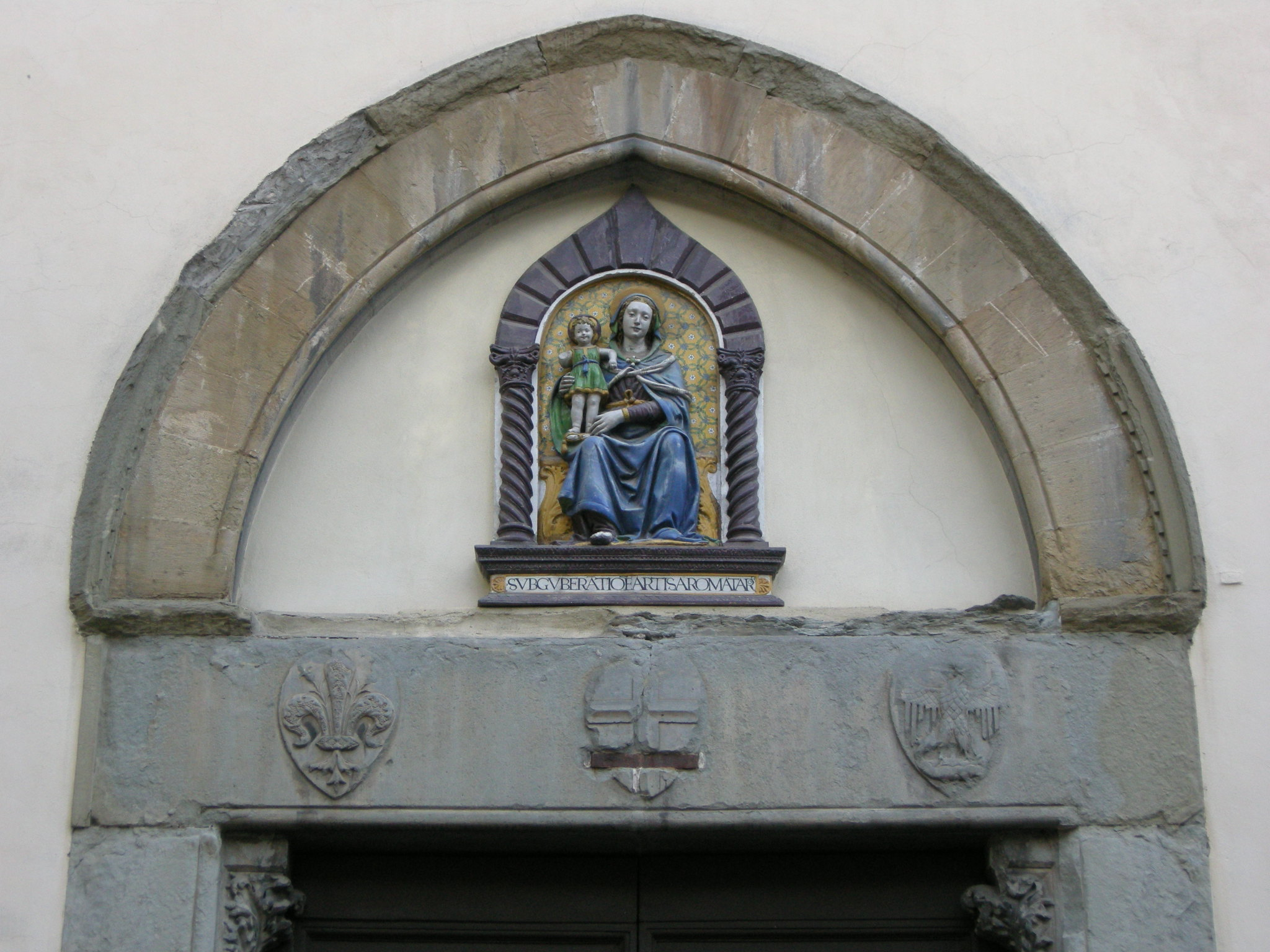 Chiesa di san barnaba, portale con terracotta policroma invetriata